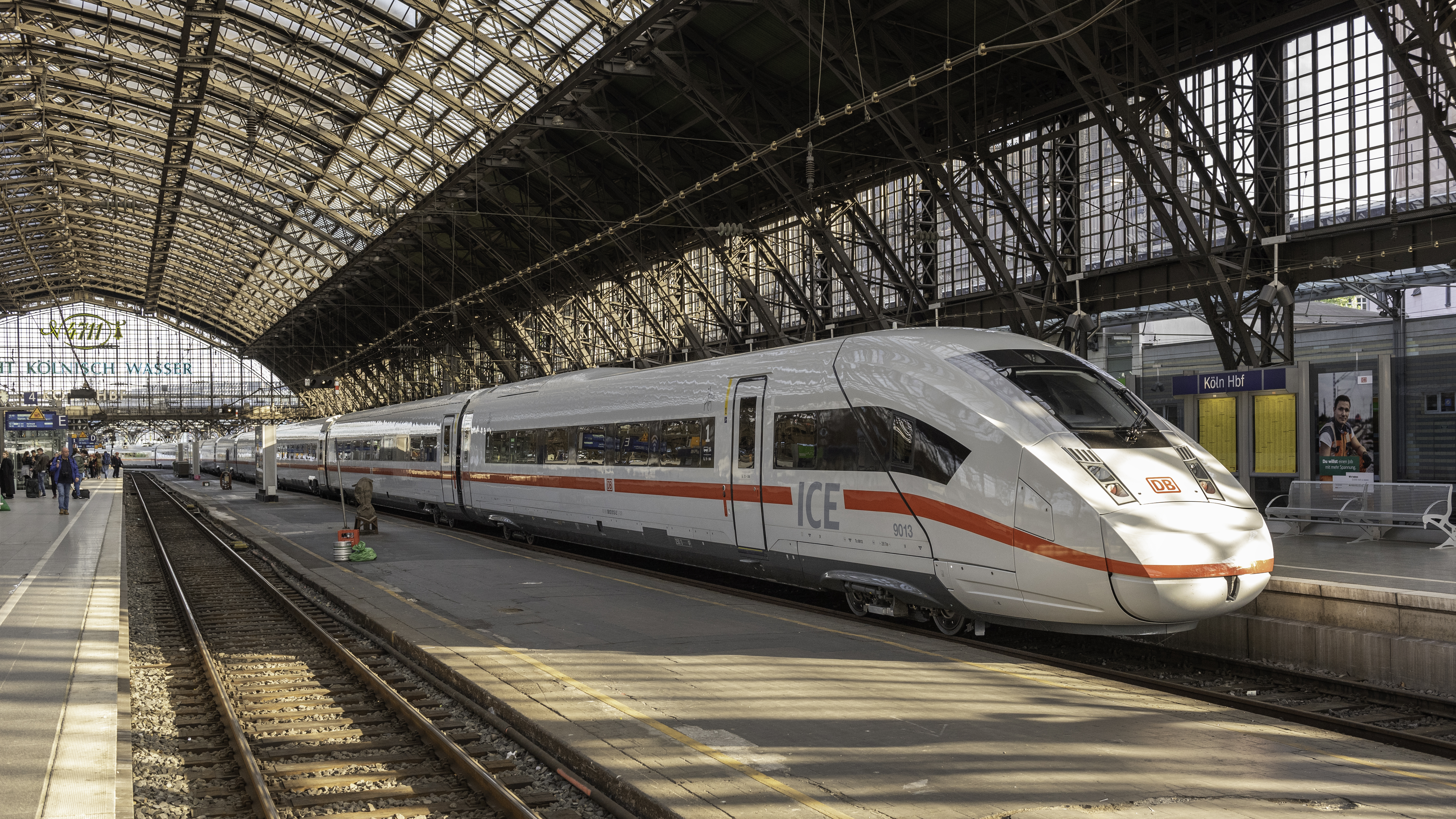 De nieuwste BR412 (ICE 4) treinstel 9013 staat klaar voor vertrek in Köln Hbf voor een afnamerit naar Hamburg Langenfelde.